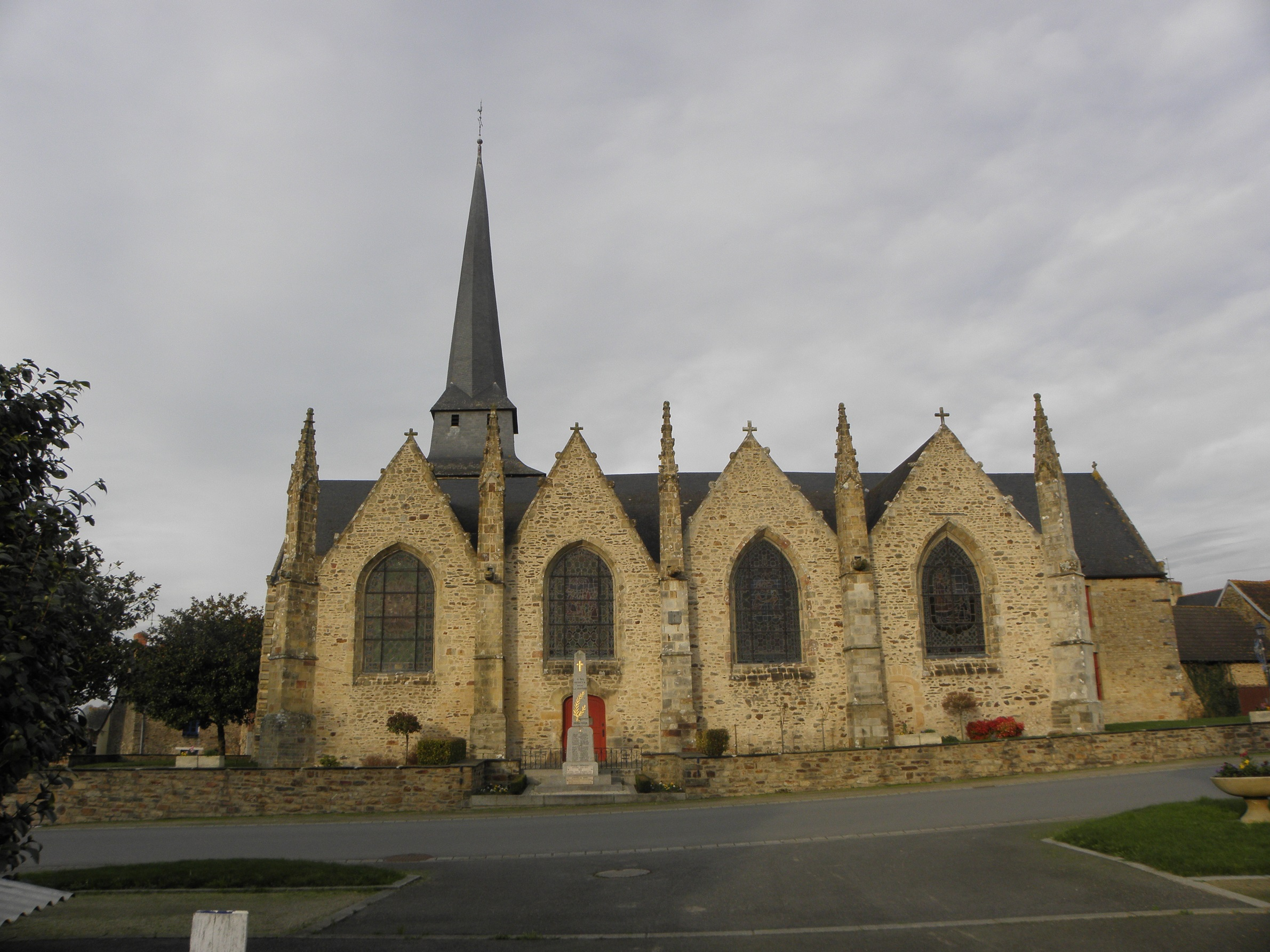 Façade sud de l'église Saint-Martin de Moutiers (35)